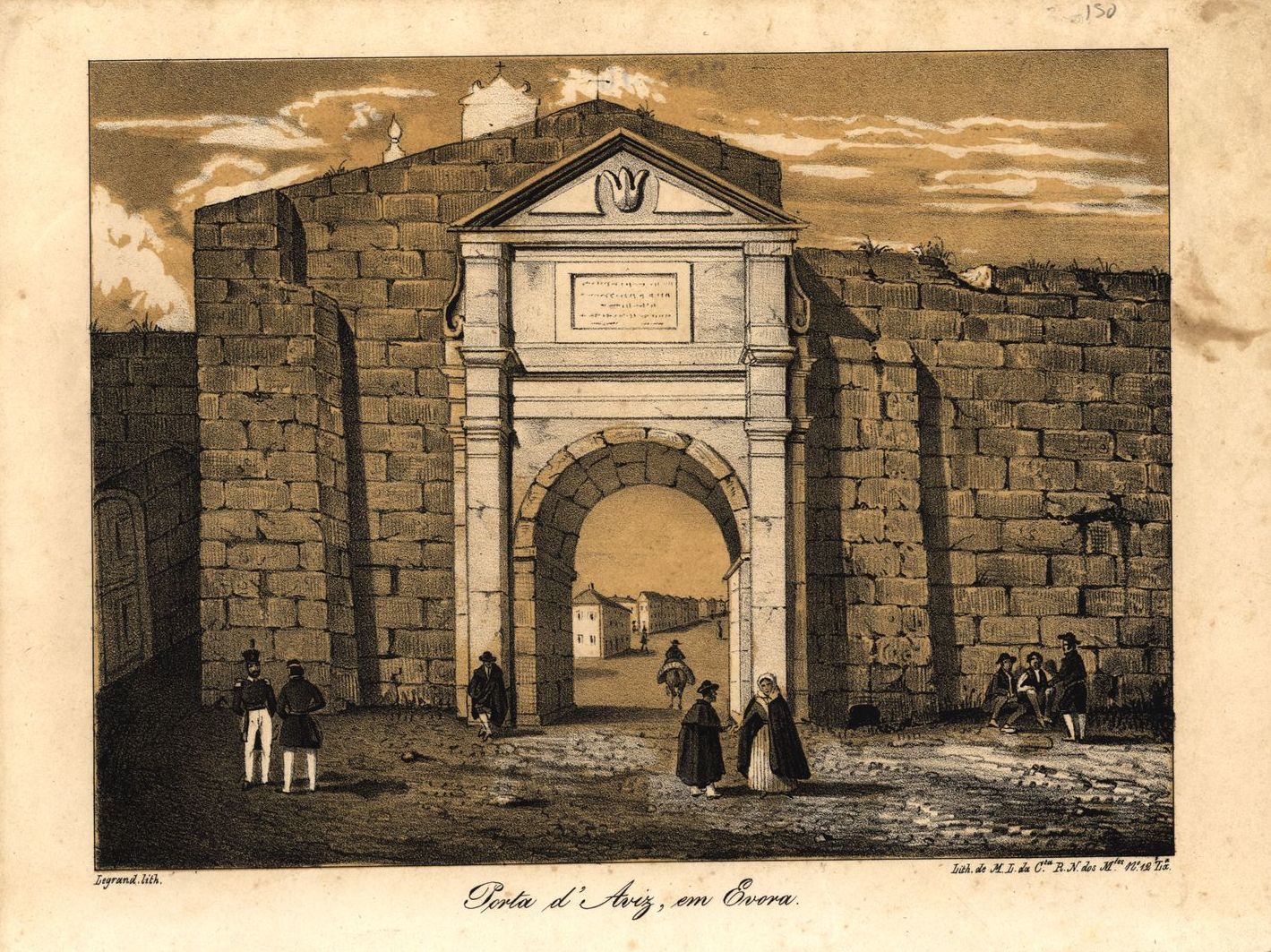 Porta D'Aviz, Évora, gravura: litografia, preto e branco (impresso sobre fundo beige), realizada entre 1839 e 1847